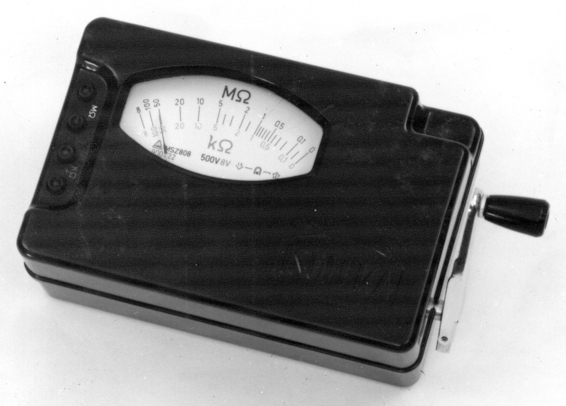 Isoleka műszer szigetelési ellenállás mérésére.